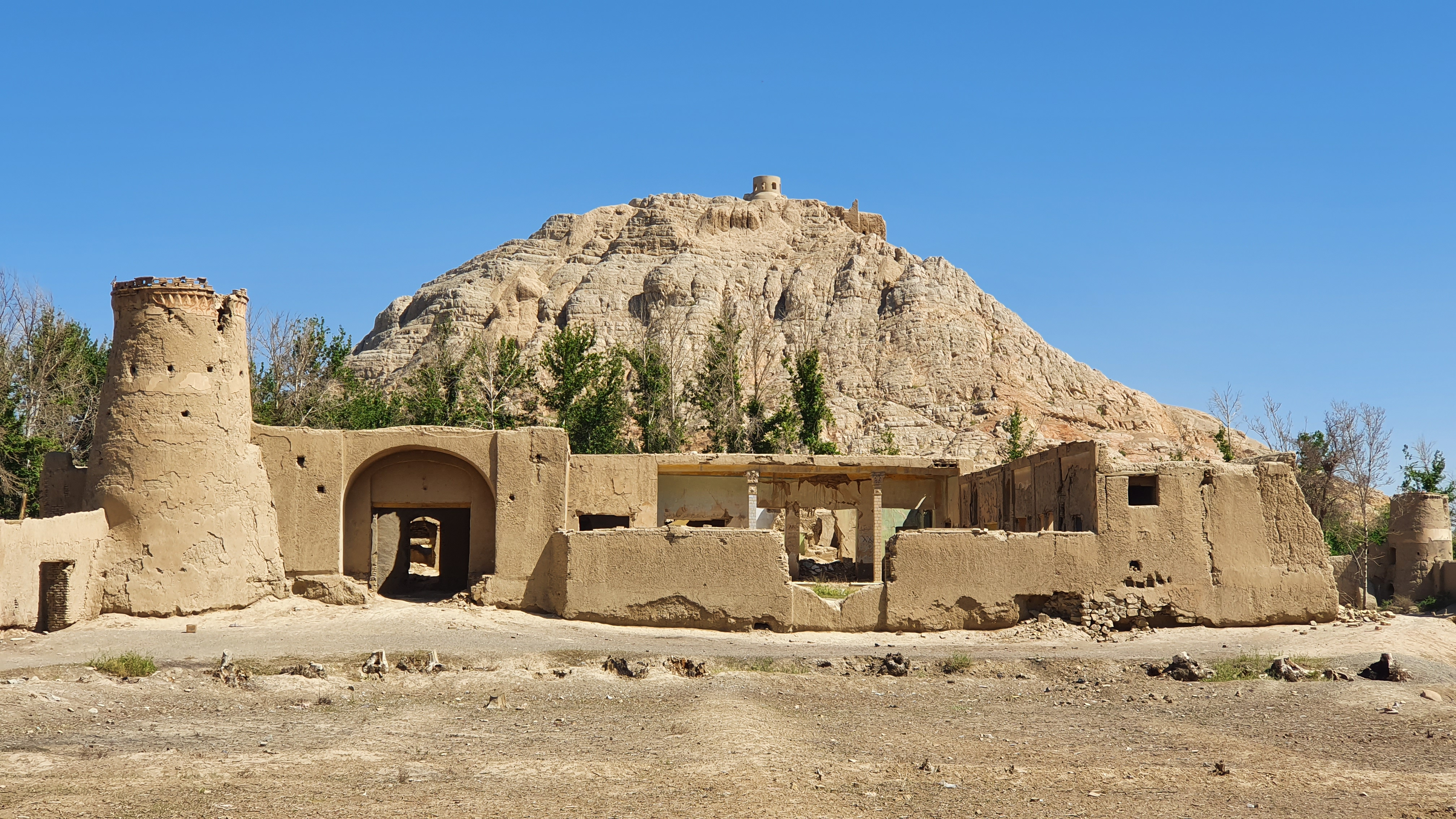 ارگ ناژوان و کوه آتشگاه واقع شده در شهر اصفهان